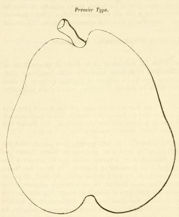 Duchesse d'Angoulême- 1er type-dictionnaire de pomologie, 1867, André Leroy (1801-1875).